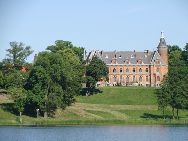 Pałac od strony jeziora Kucki (zabytek nr rejestr. 1266)